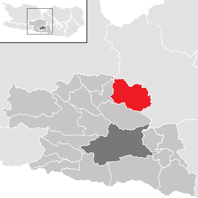 Bezirk Villach-Land